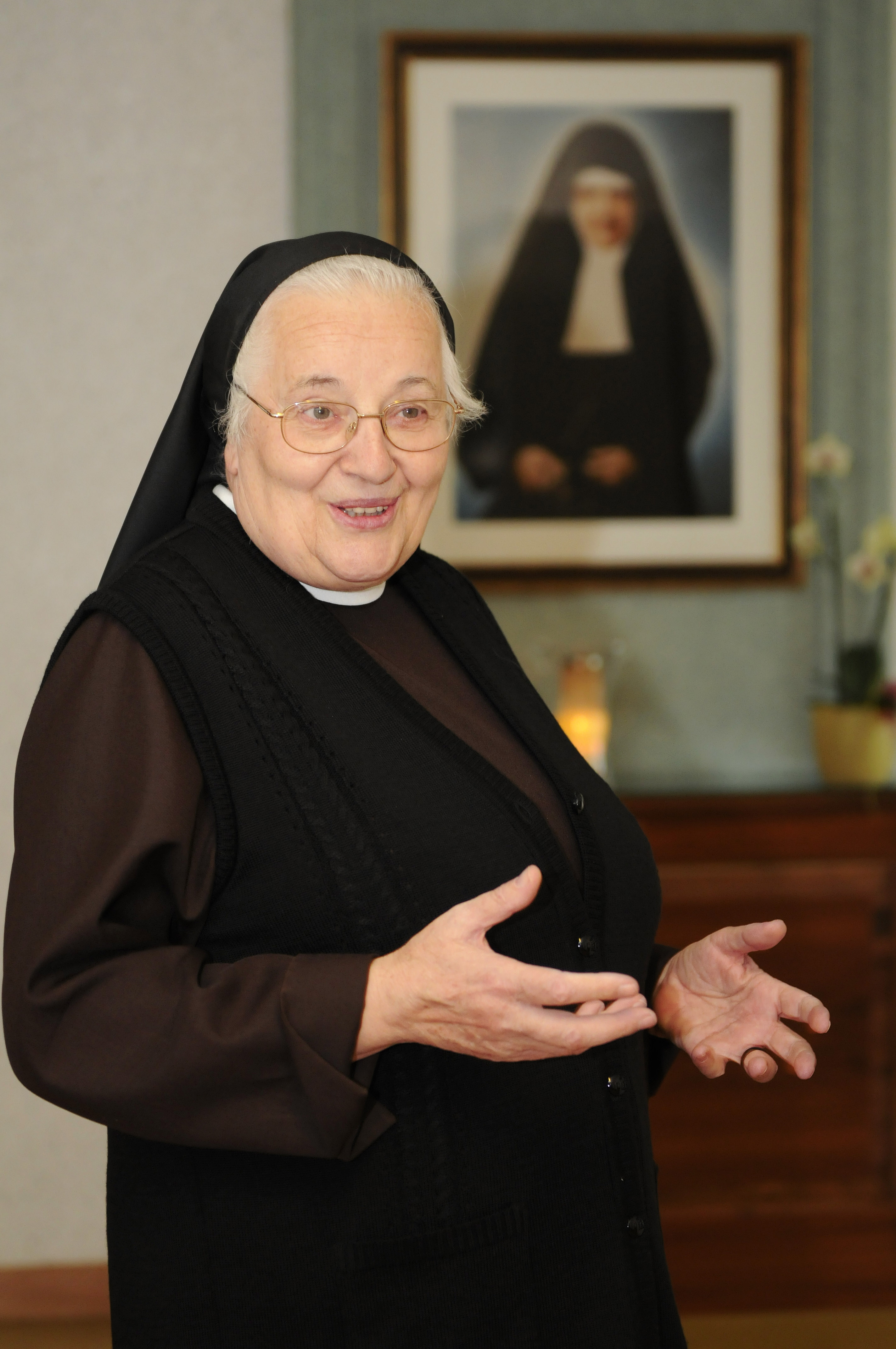 Schwester Consilia Hofer, Genraloberin der Franziskaner-Missionsschwestern von Maria Hilf, im Bernardaheim (Provinzialat Europa) in Frastanz, Vorarlberg, Österreich.